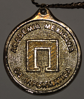 Fotografía de una medalla de miembro de la Academia. La medalla me pertenece y yo saqué la foto y la edité